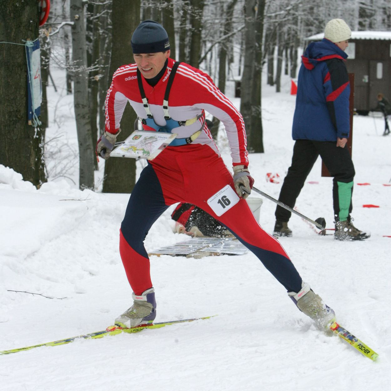 V lyžiarskom OB má pretekár na hrudi špeciálny mapník, v ktorom má mapu s traťou a môže sledovať trať aj počas behu v plnom tempe.